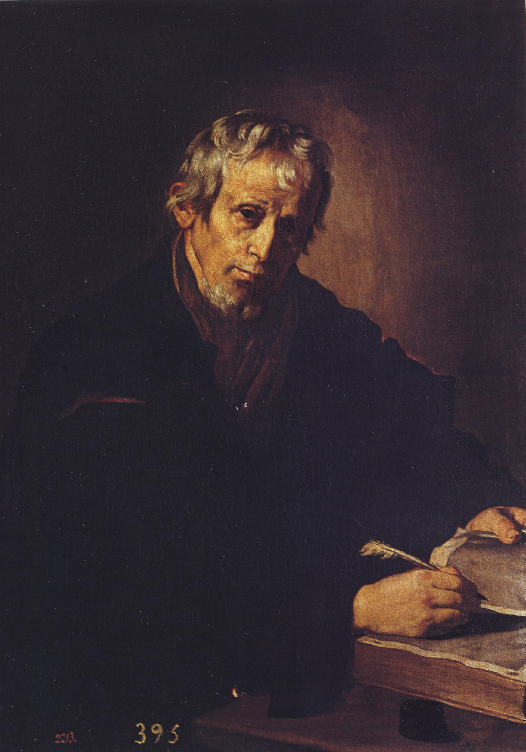 Filófoso escribiendo. Museo del Prado, depósito en la Universidad de Sevilla. Atribuido en el inventario de 1747 del Palacio Real de Madrid a Juan Fernández, el Labrador de las Navas.